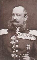 Generalmajor Hermann Karl Dietrich von Rantzau